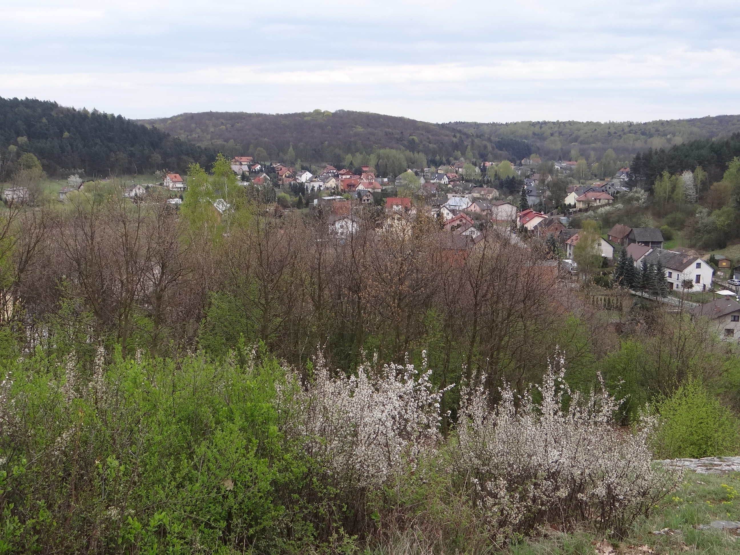 Widok z Wielkanocy na Tyniec. W głębi Ostra Góra